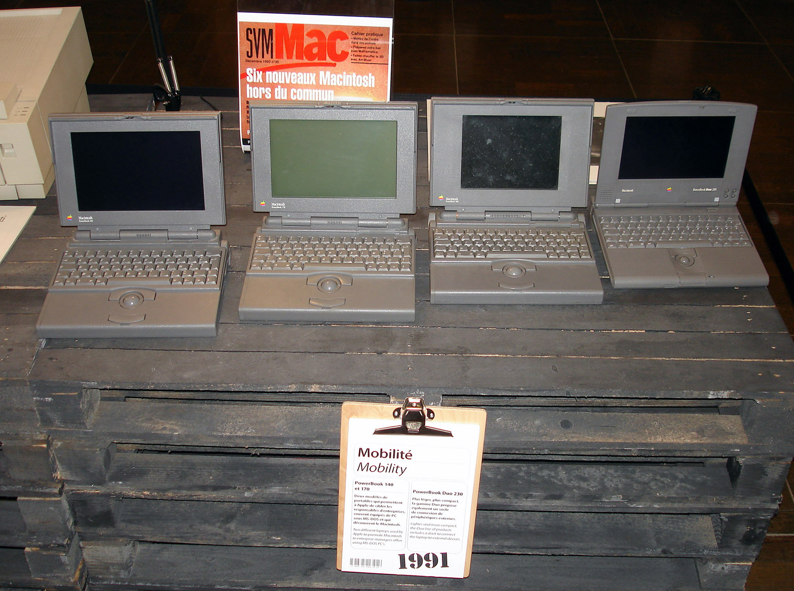 Exposition des 25 ans du Mac au musée de l'Informatique à La Défense, Hauts-de-Seine, France. PowerBook 140 et 170. PowerBook Duo 230.